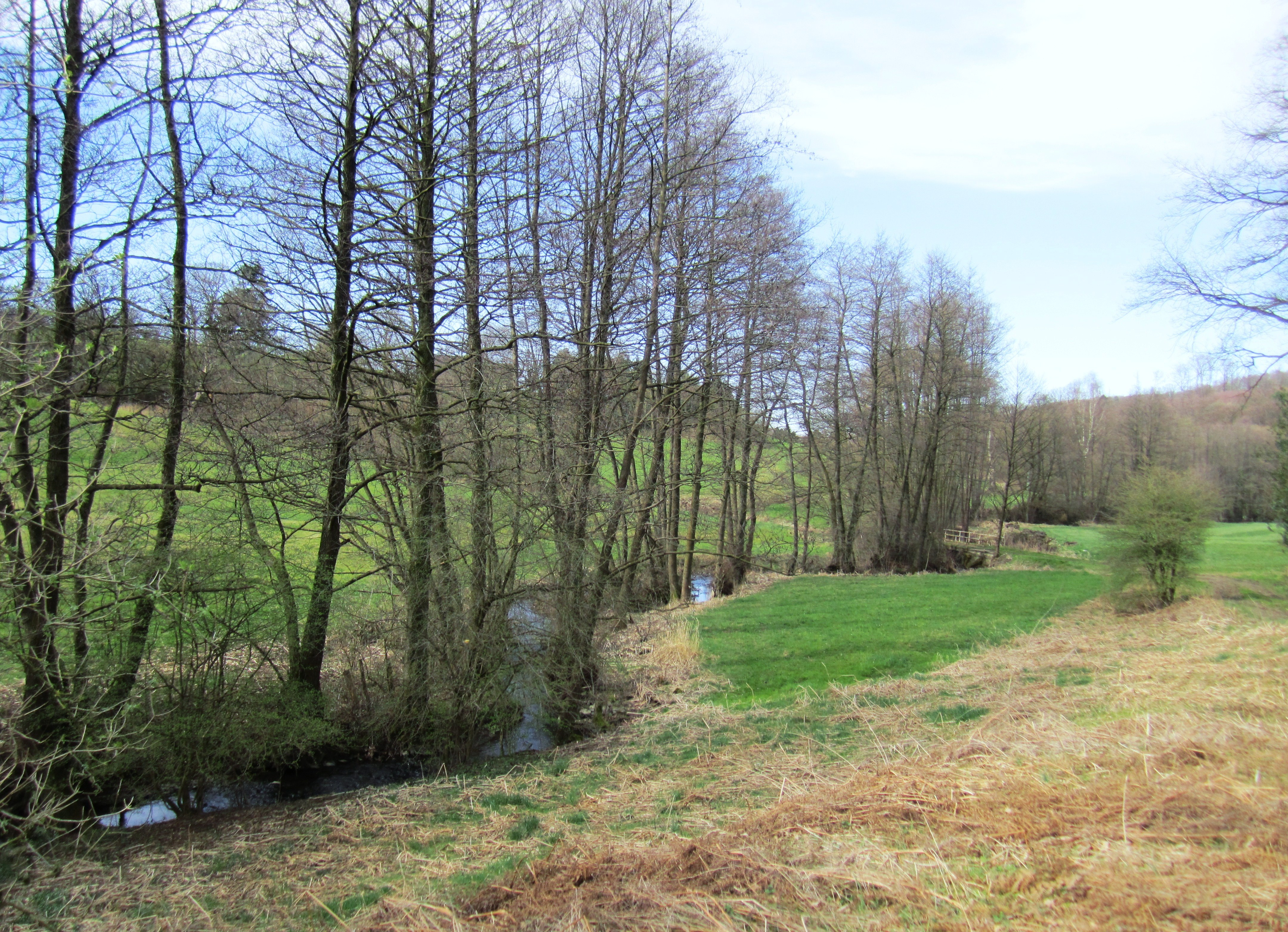 Der Felderbach im Bärwinkel (erstmals 1220 als Lehnshof der Reichsabtei Werden erwähnt) in Hattingen-Elfringhausen. Der abgebildete Bereich um den Felderbach liegt im Landschaftsschutzgebiet Felderbachtal/Paasbachtal/Deilbachtal.